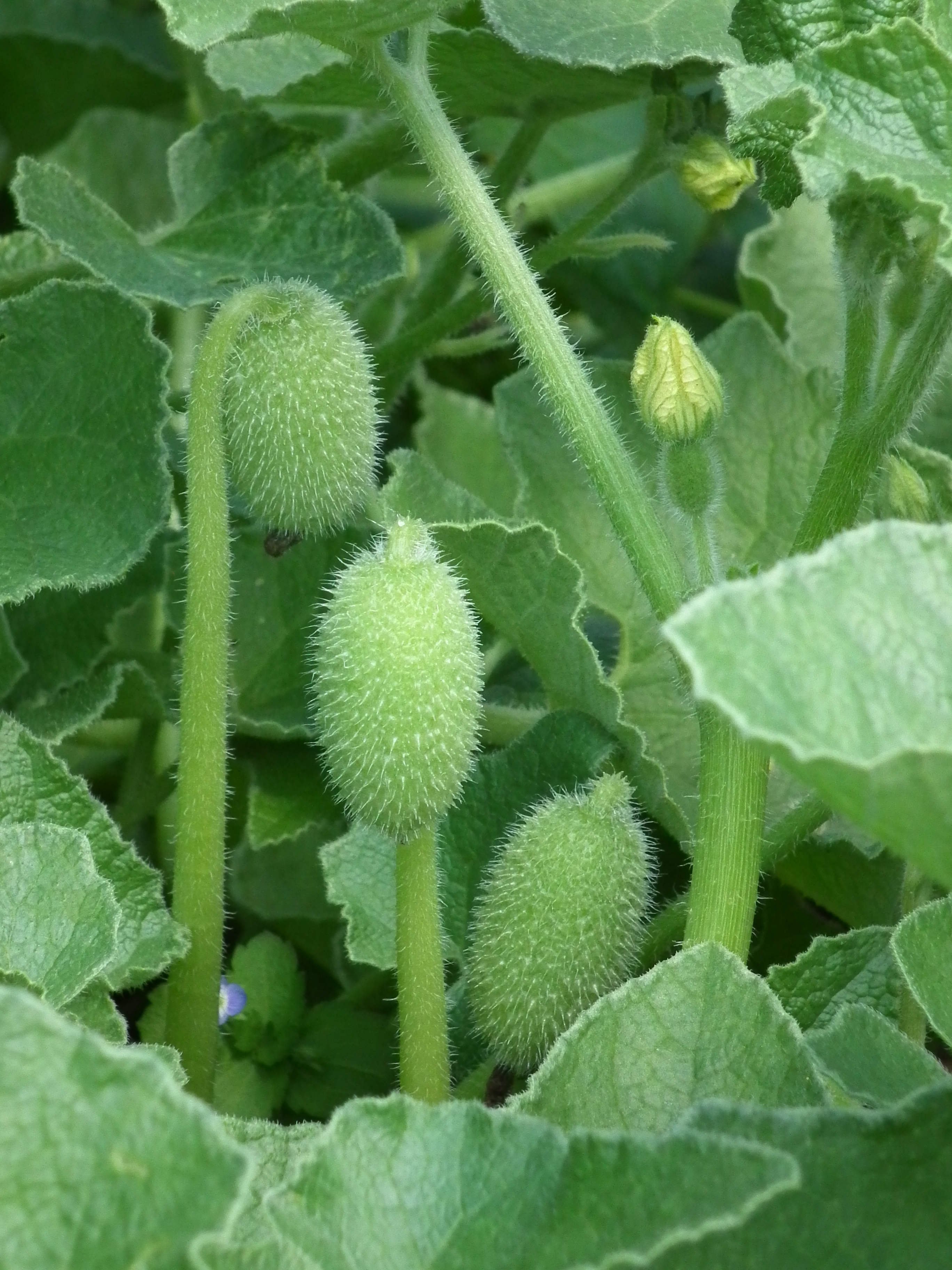 (Ecballium elaterium), fotografiert in Heidelberg, Baden-Württemberg, Deutschland.